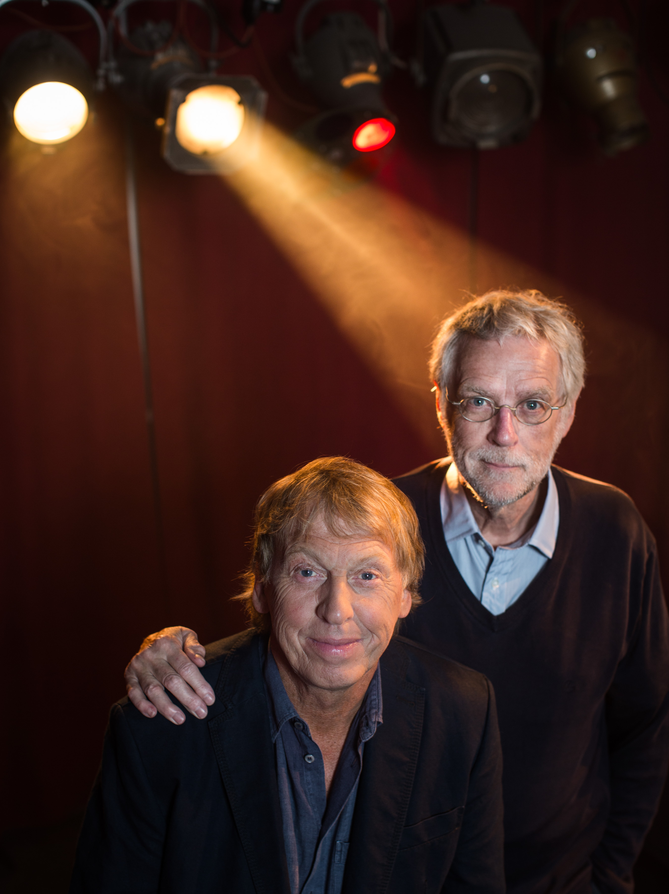 Skådespelaren Tomas von Brömssen (t.v.) och regissören Bo Hermansson.